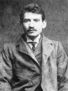 Photo de journaliste Marius Jacob en date de 1905 (domaine public)